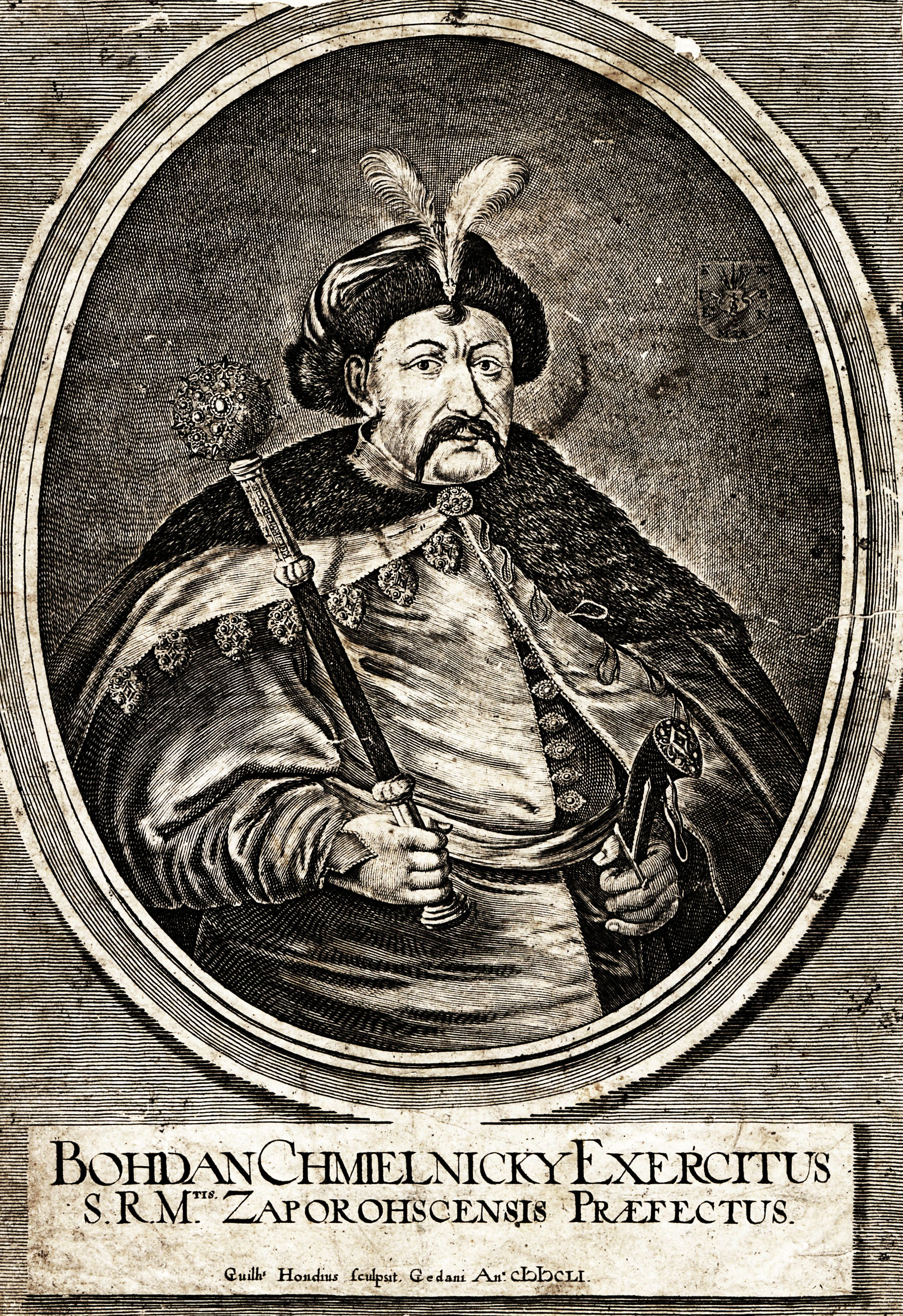 Portret Bohdana Chmielnickiego